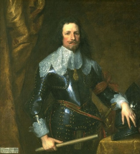 Thomas von Savoyen, Fürst von Carignantitle QS:P1476,de:"Thomas von Savoyen, Fürst von Carignan" label QS:Lde,"Thomas von Savoyen, Fürst von Carignan"